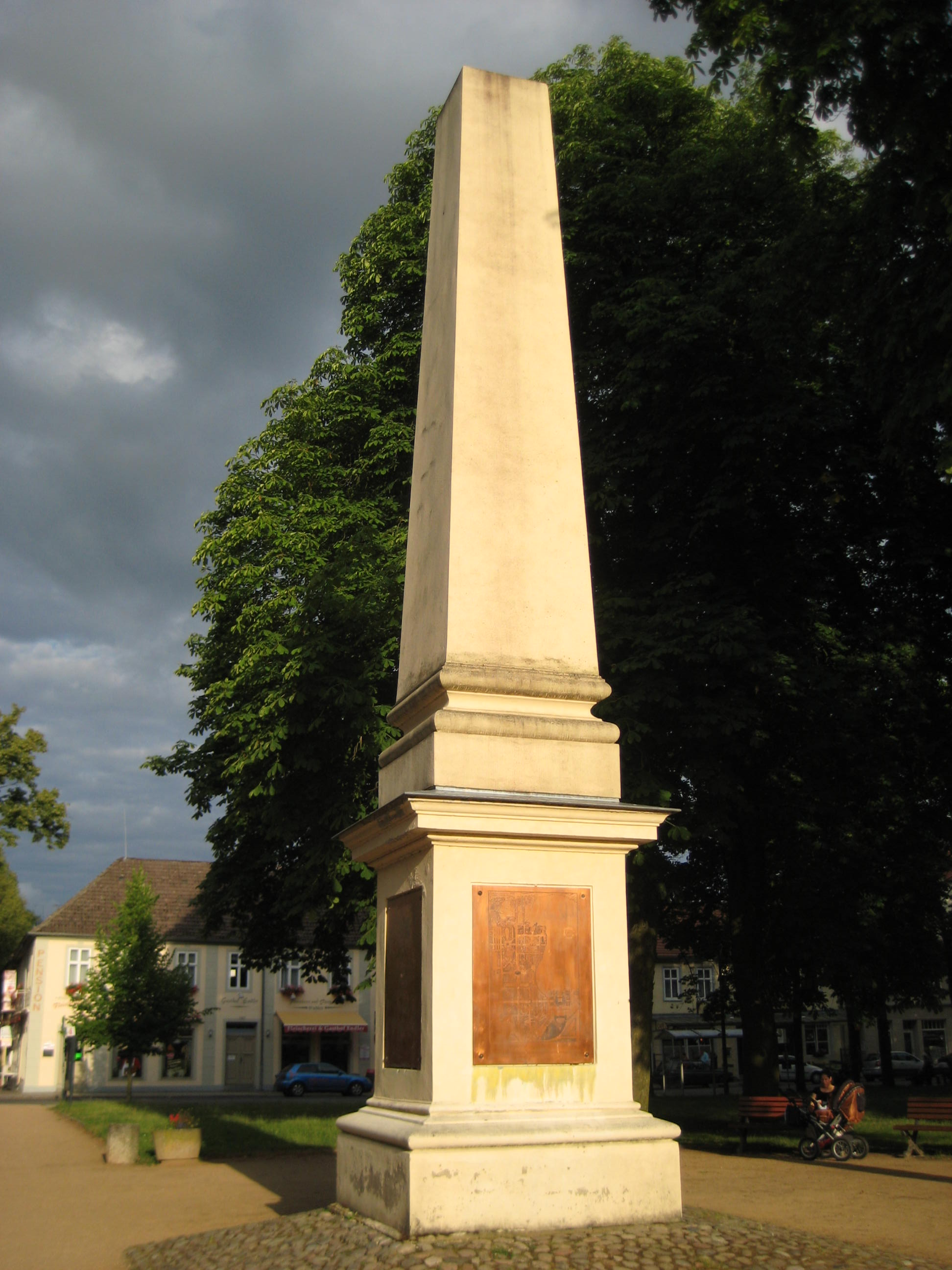 Post-Meilenstein in Rheinsberg; eine angebrachte Tafel enthält Entfernungsangaben in Meilen nach Stockholm, Sankt Petersburg, Berlin und Potsdam